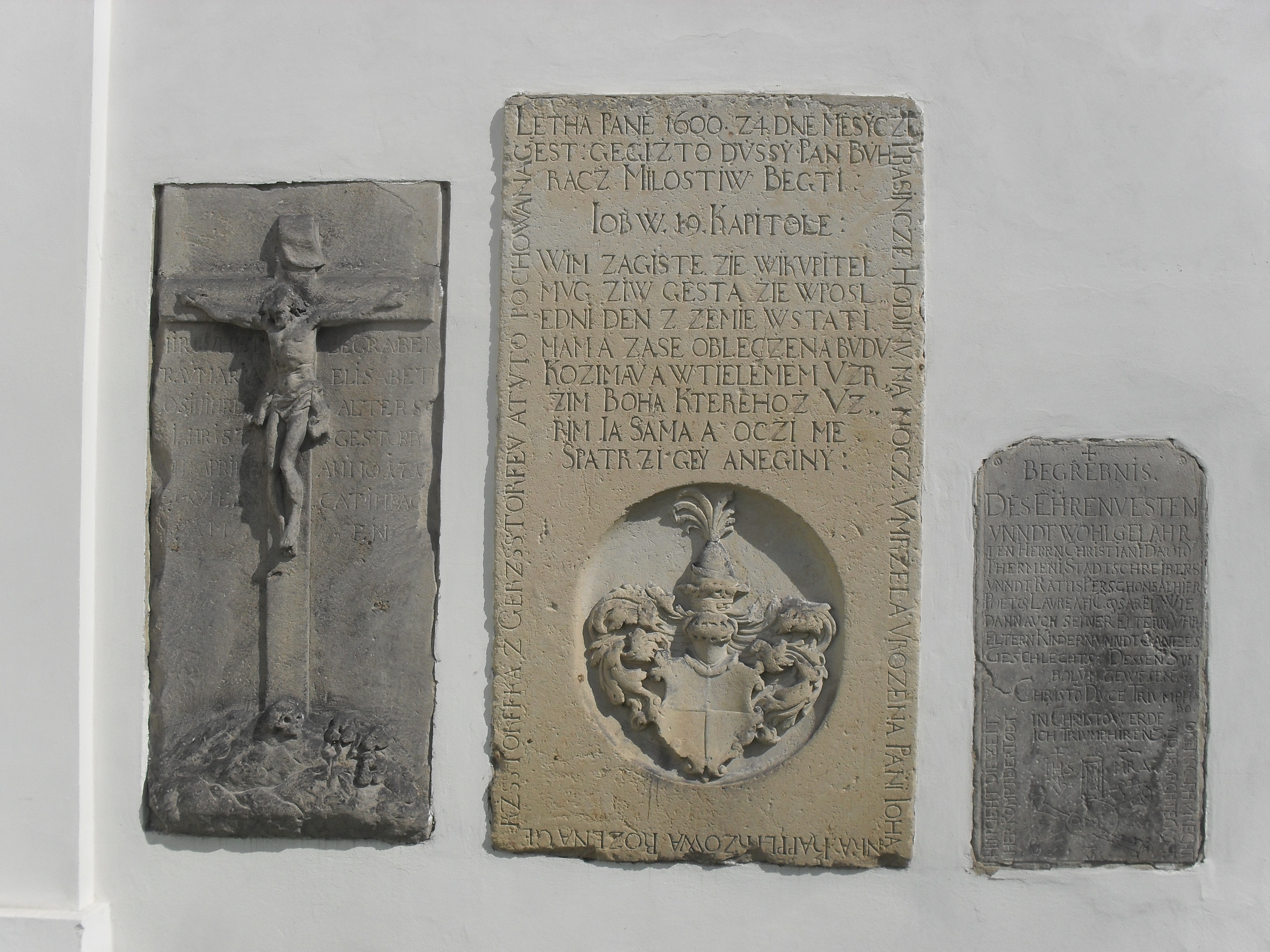 TTO: Kostel sv. Jana Křtitele (Teplice)- Teplice, Zámecké náměstí 135.